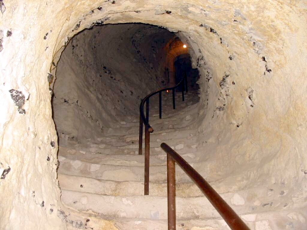 Château de la Roche-Guyon, Val-d'Oise (France) - escalier creusé dans le calcaire menant au donjon